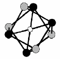 Environnement d'un atome d'or dans Y3Au3Sb4